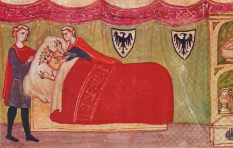 Manfréd dusí Fridricha II. Štaufského polštářem - historicky nedoloženo